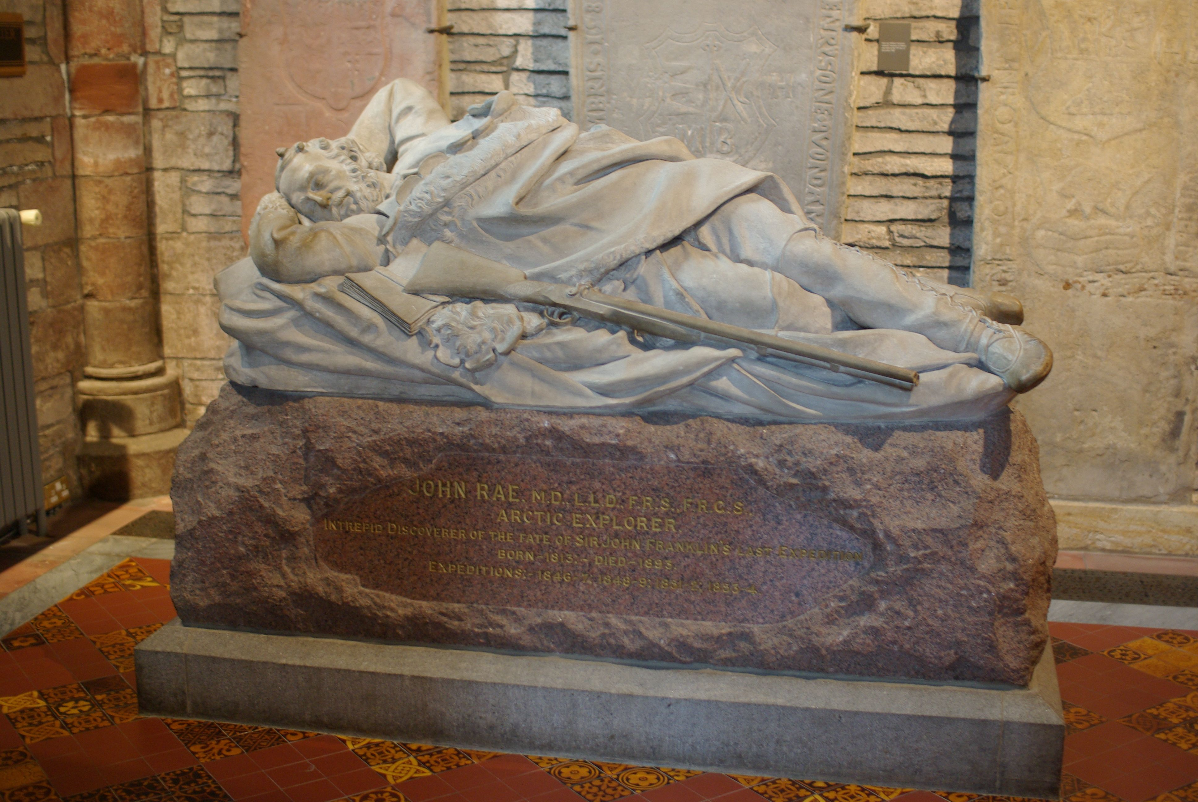 Kirkwall, Orkney, Schottland. Im Dom im Bereich des Hochchores befindet sich ein Denkmal des Artisforscher John Rae.